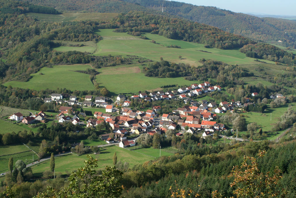 Rutsweiler an der Lauter von der benachbarten Heidenburg aus gesehen.